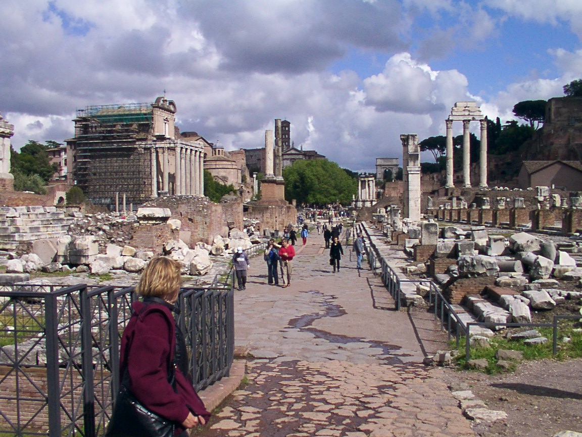 מבט על פורו רומה